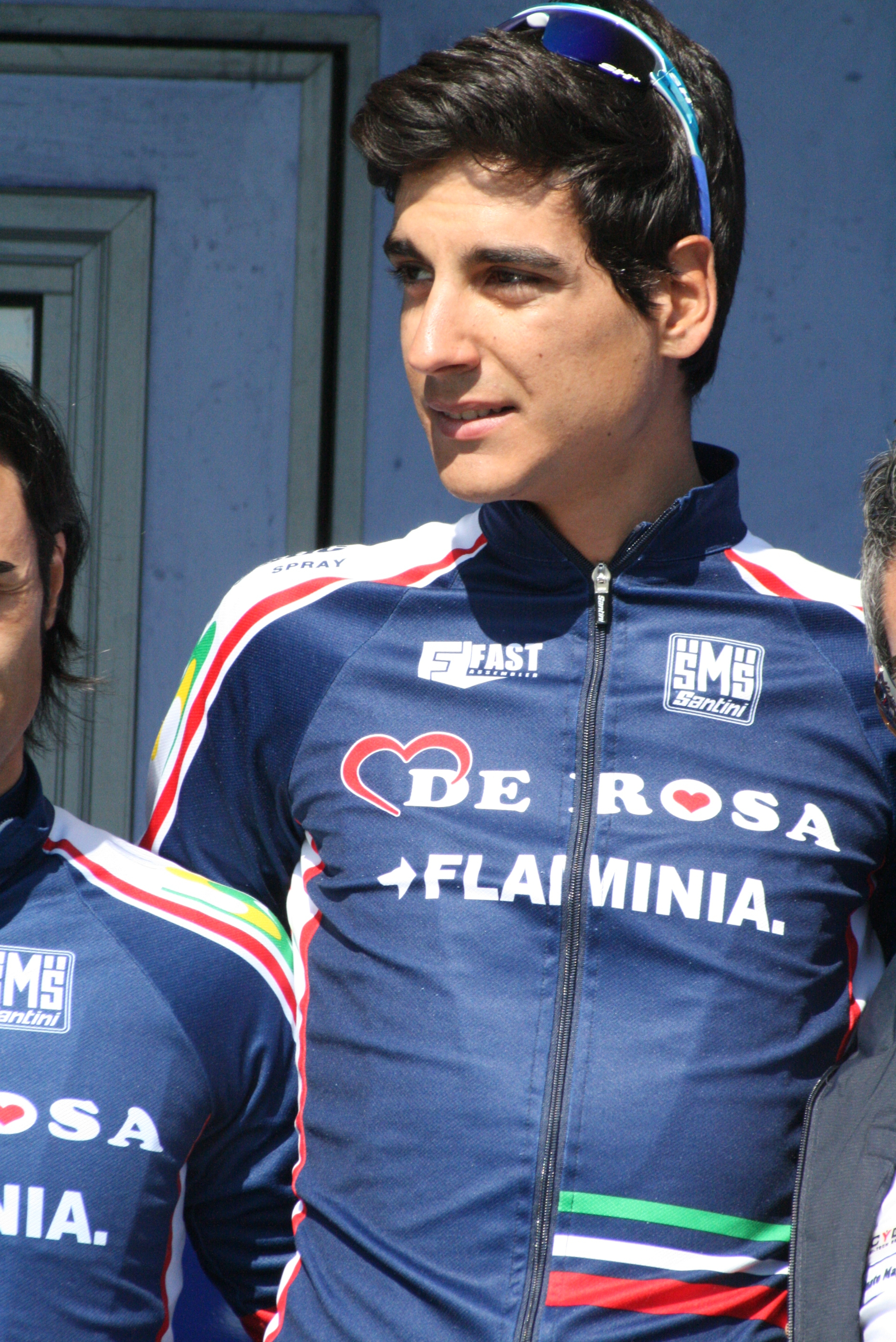 Présentation des coureurs au départ de la première étape Stefano Borchi